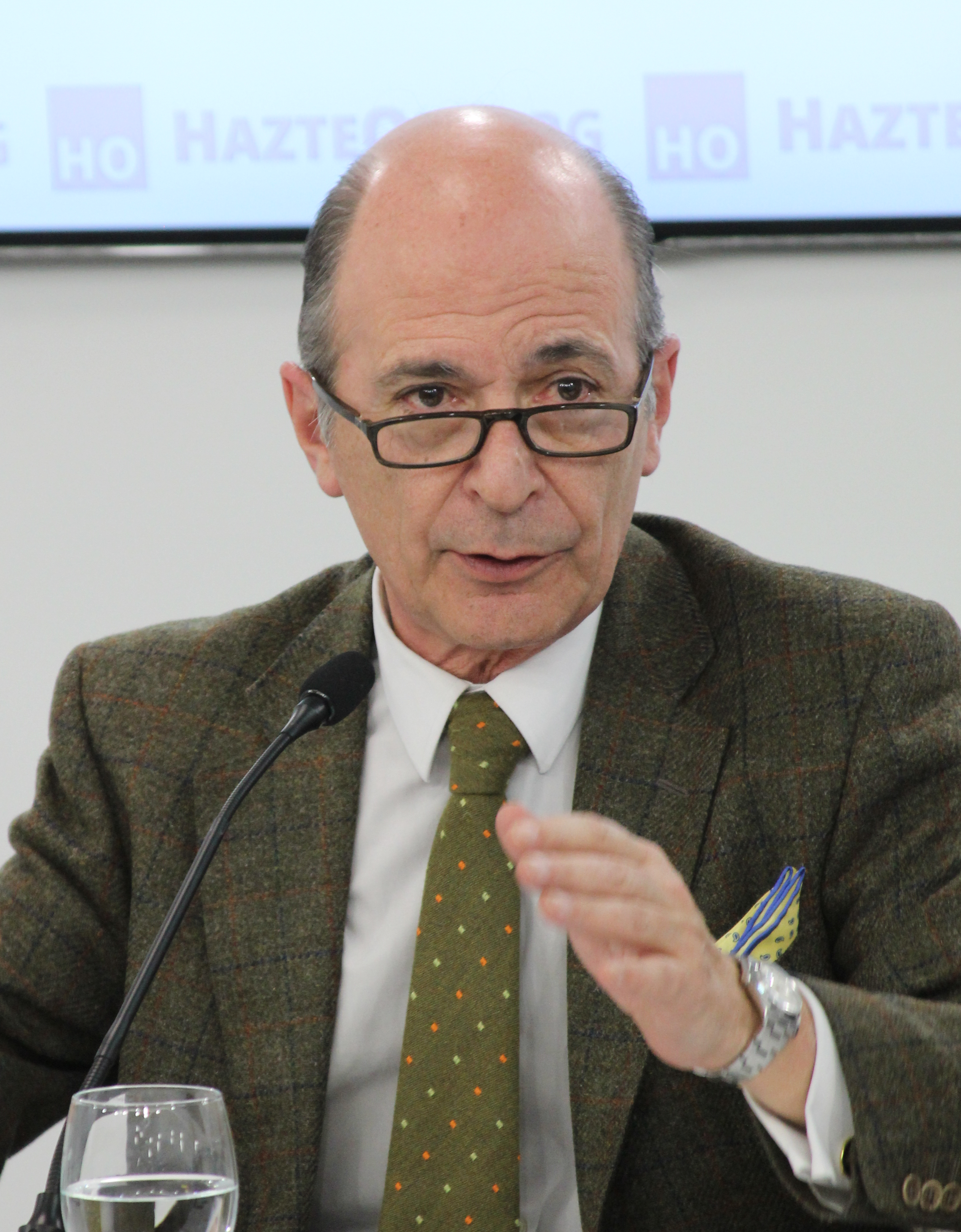 El economista Carlos Rodríguez Braun, en la #tertuliaHO: "A mi lo que más me impresiona de los españoles es lo mal que pensáis vosotros de vosotros mismos."